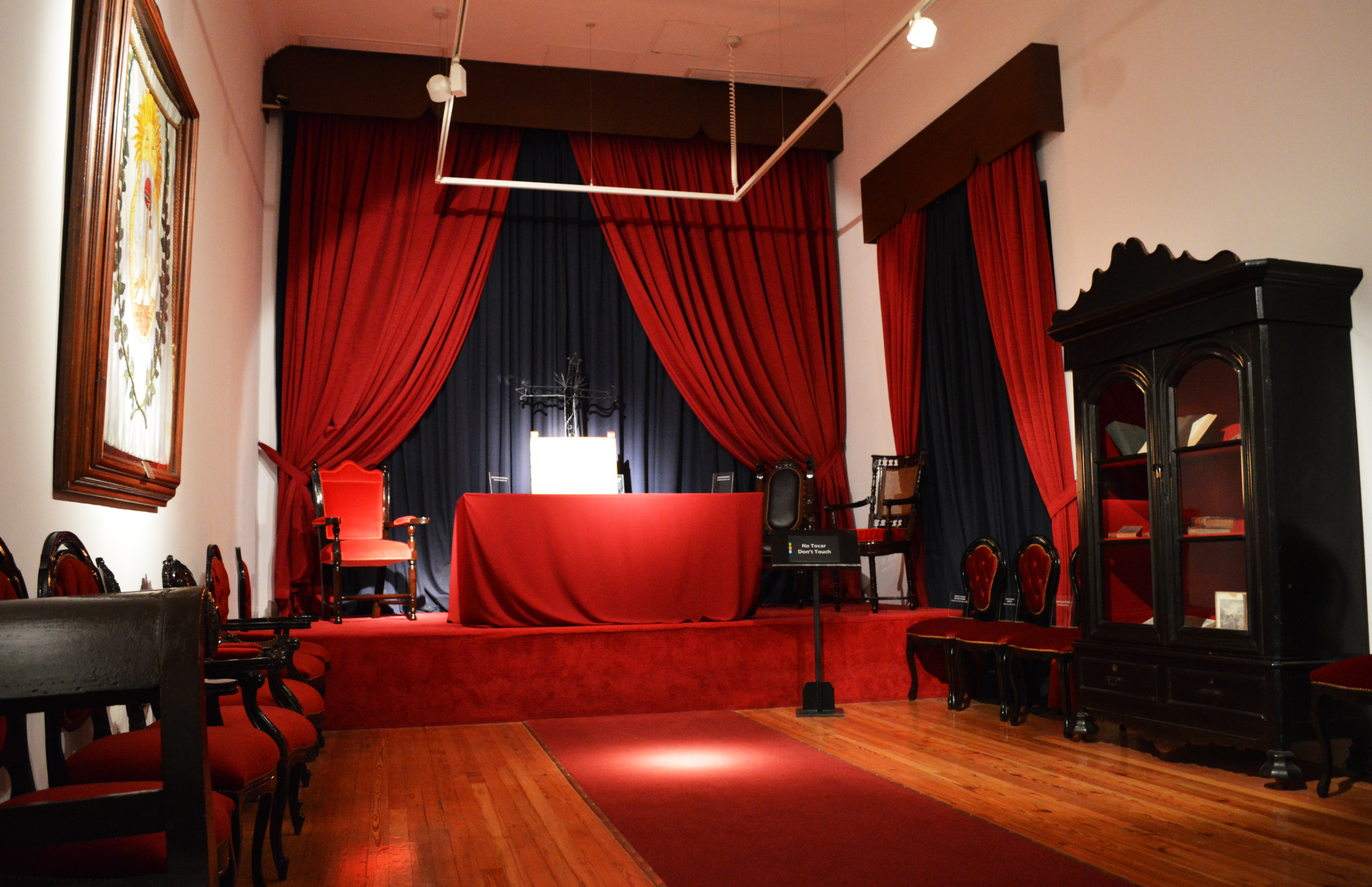 Sala Capitular del edificio histórico donde se alberga el Centro Cultural del Bicentenario de Santiago del Estero, Argentina.